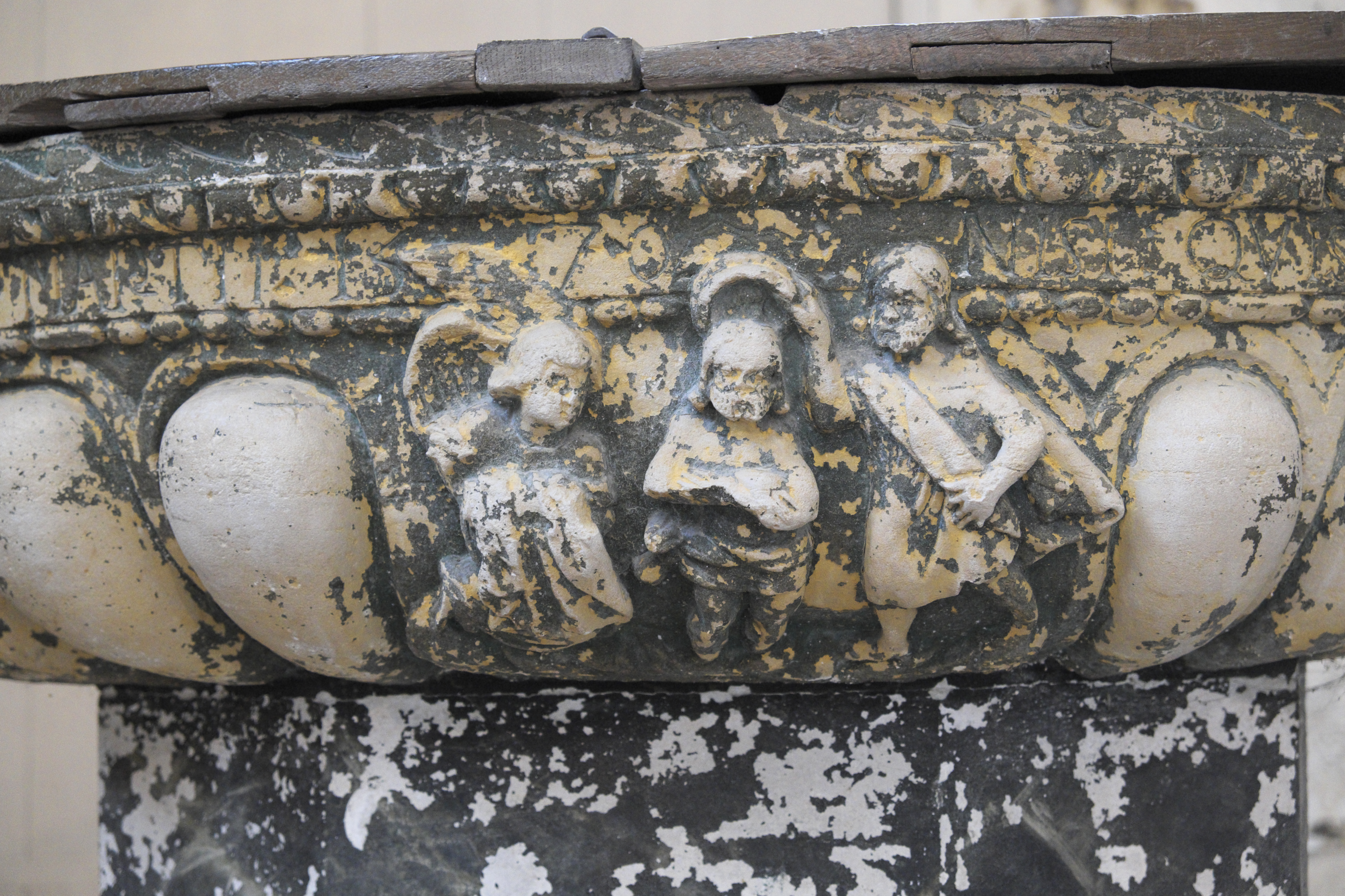 Katholische Kirche Sainte-Croix in Bray-sur-Seine im Département Seine-et-Marne (Region Île-de-France/Frankreich), Taufbecken, Relief der Taufe Jesu